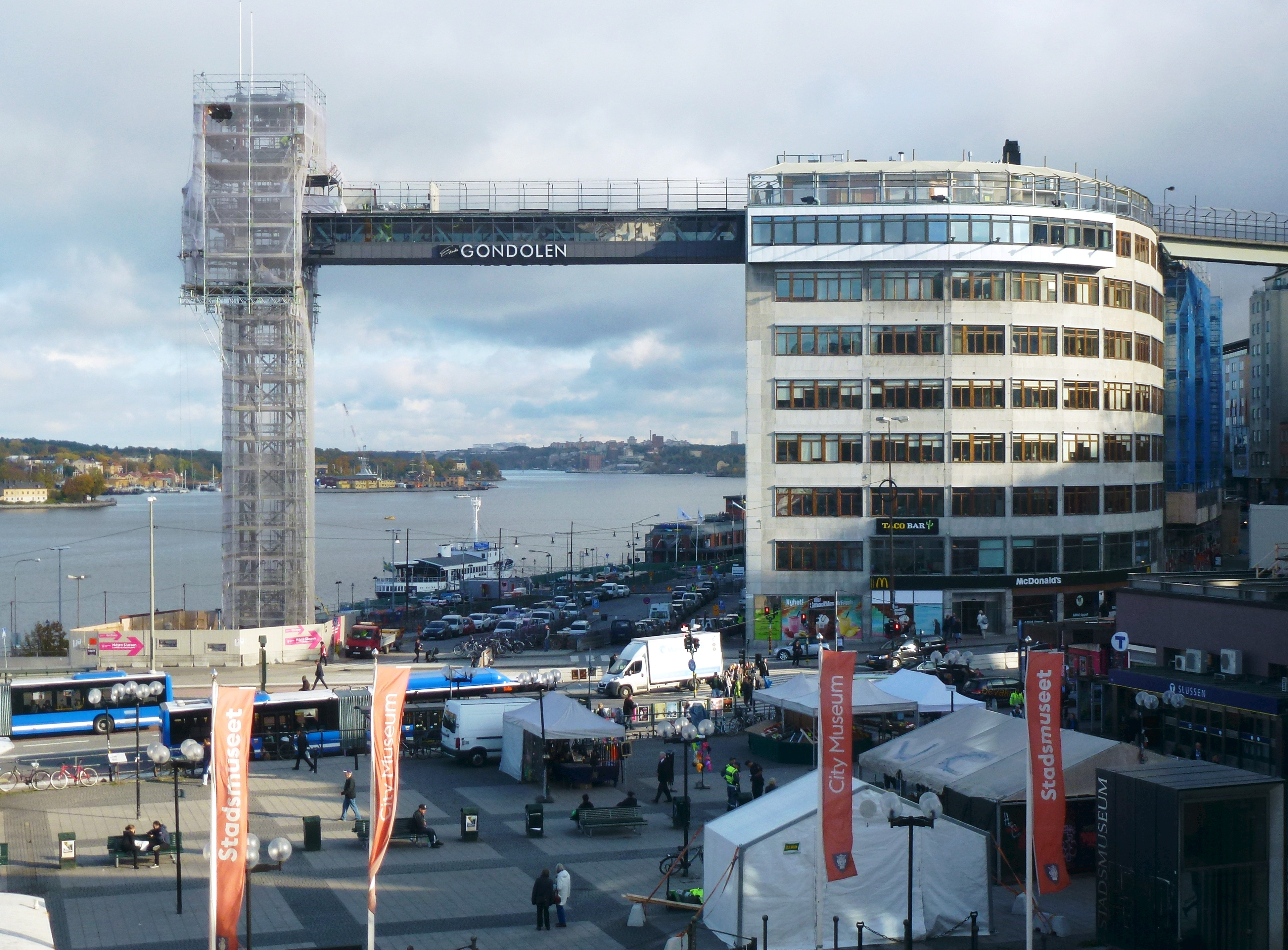 Katarinahissen, renovering